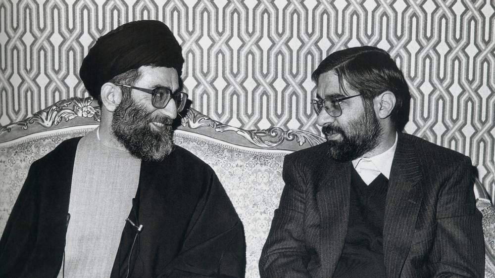 میرحسین موسوی (راست) و علی خامنه‌ای (چپ)